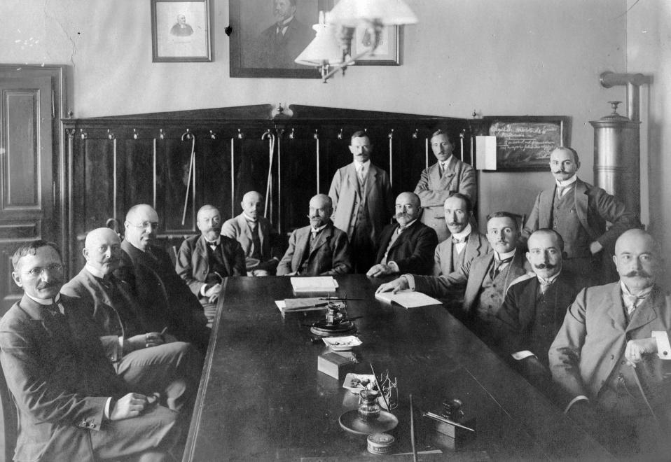 Sopron. Széchenyi tér, Evangélikus Líceum (ma Berzsenyi Dániel Evangélikus (Líceum) Gimnázium, Szakképző Iskola és Kollégium). tanárai a tanári szobában.